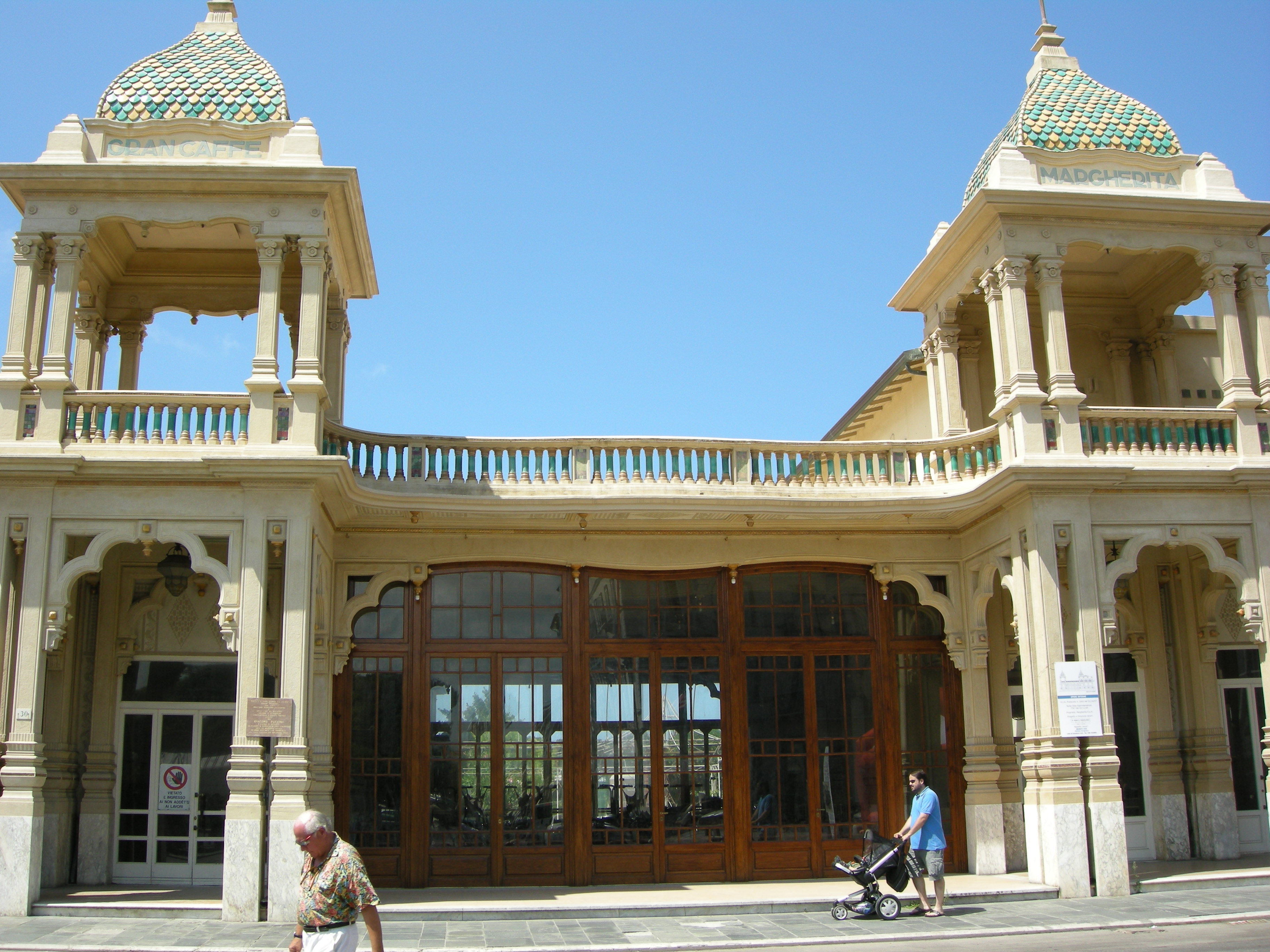 Passeggiata di viareggio 07 gran caffè margherita